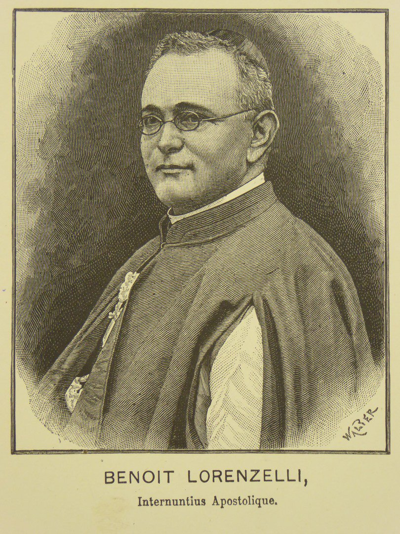 Benoit Lorenzelli, internuntius Apostolique, gravure J. Walter (coll. Catharijne Convent)